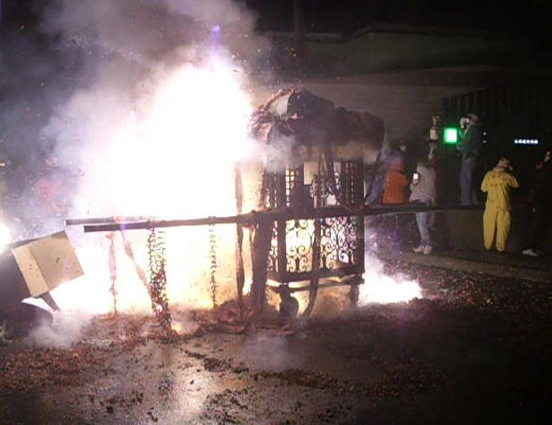 中文（台灣）: 土地公過去是坐椅轎猶有法度弄，這馬坐大轎就無法得，轎就囥咧予炮仔炸。